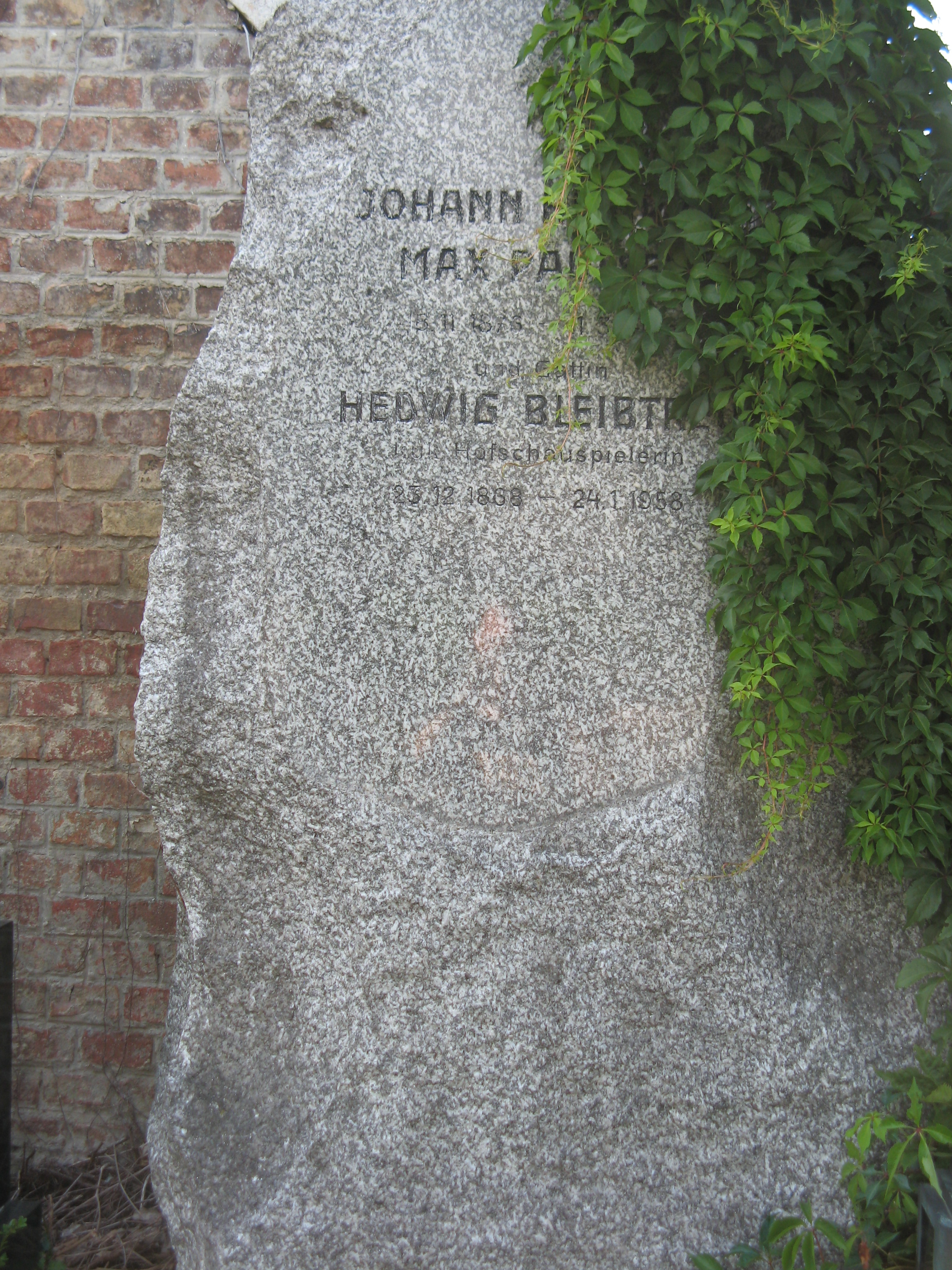 Wien, Pötzleinsdorfer Friedhof, Grabmal Hedwig Bleibtreu